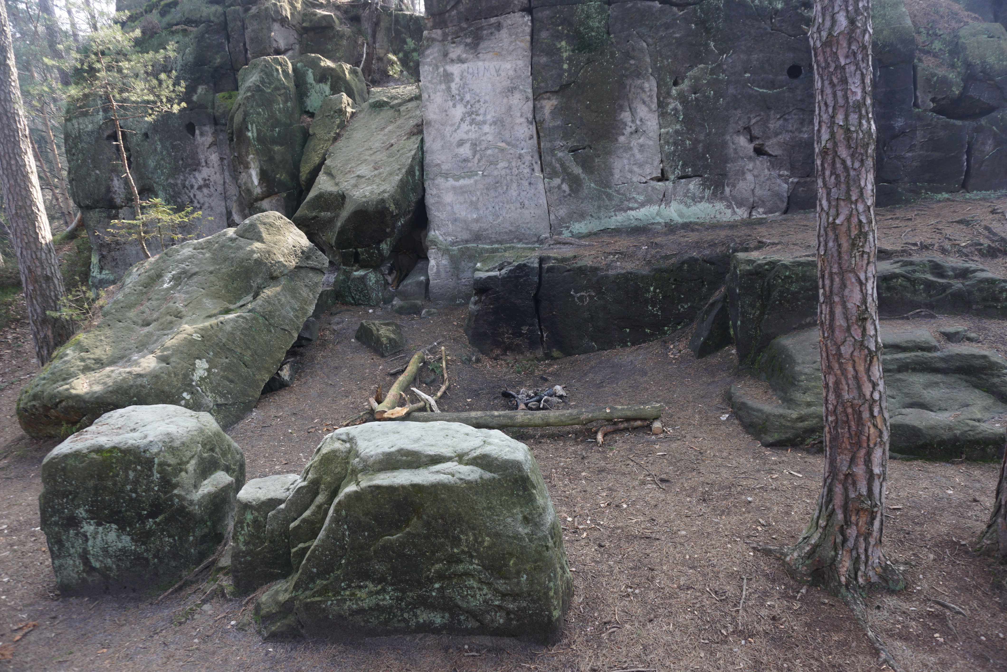 Kavčiny - pozůstatky skalního hrádku nedaleko Valdštejna